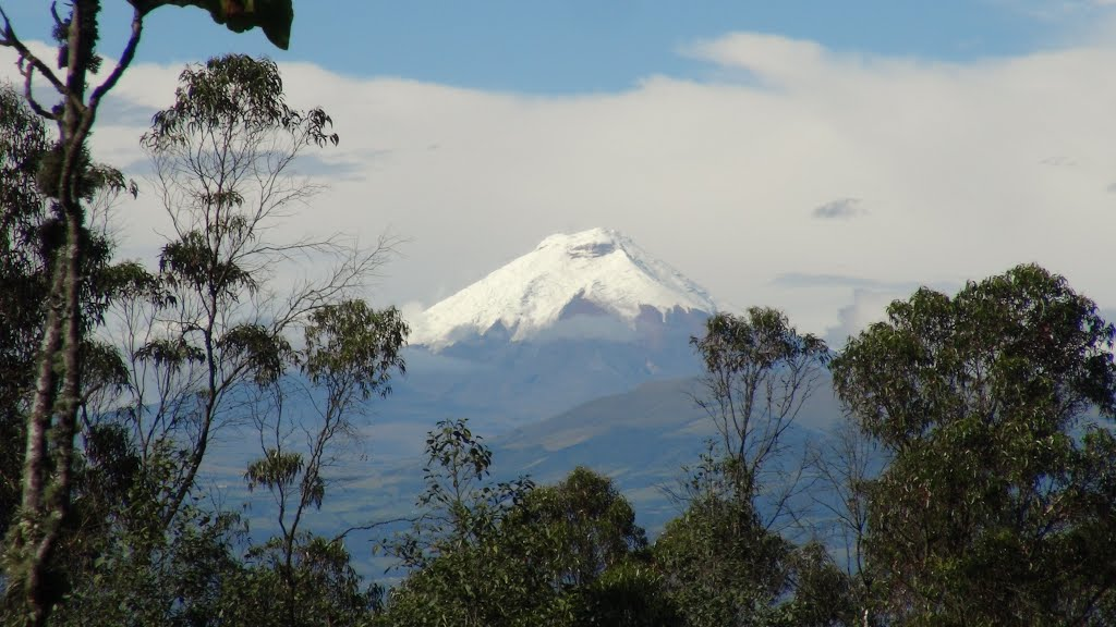 Quito, Ecuador